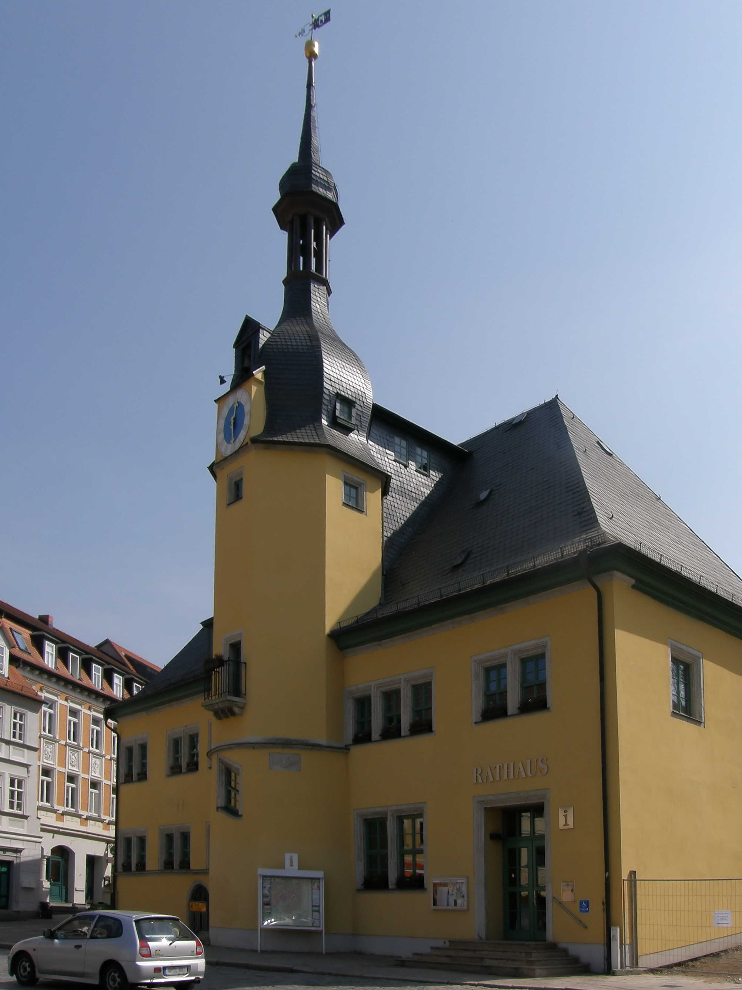 Stadt Apolda - Rathaus am Markt